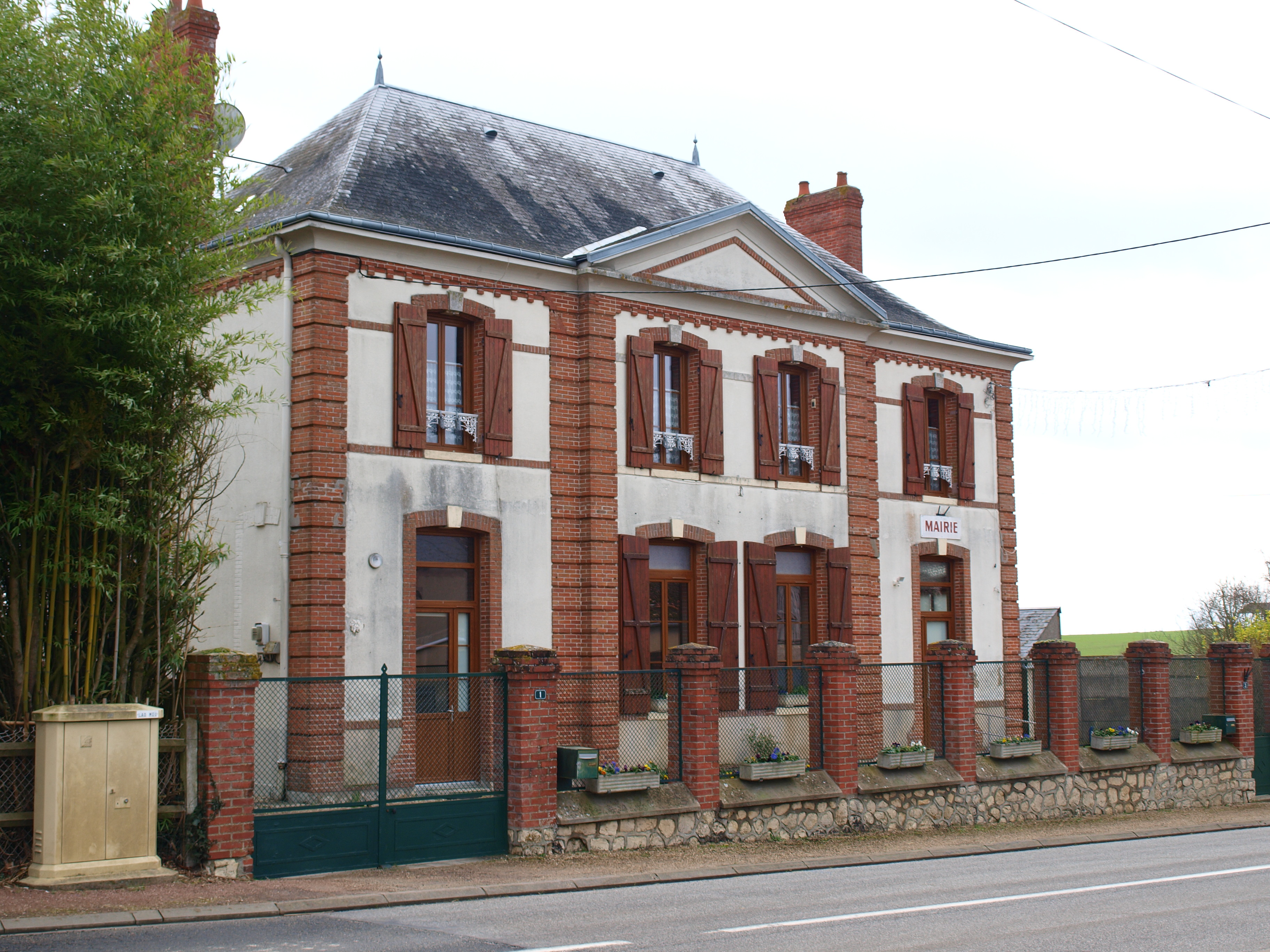 Moulon (Loiret, France) ; mairie